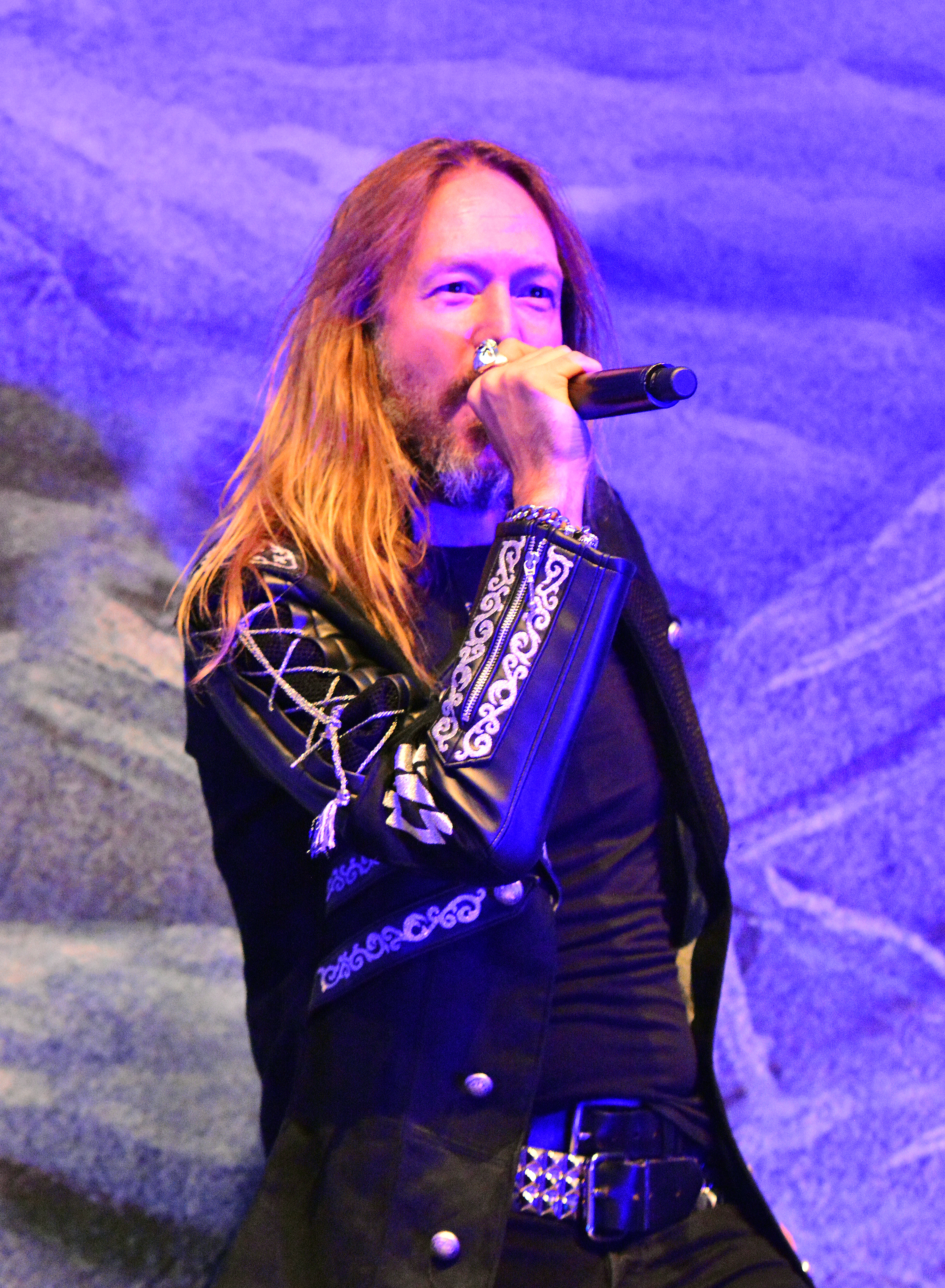 Hammerfall beim Waterkant X-Mas Bash 2015 in der Sporthalle Hamburg